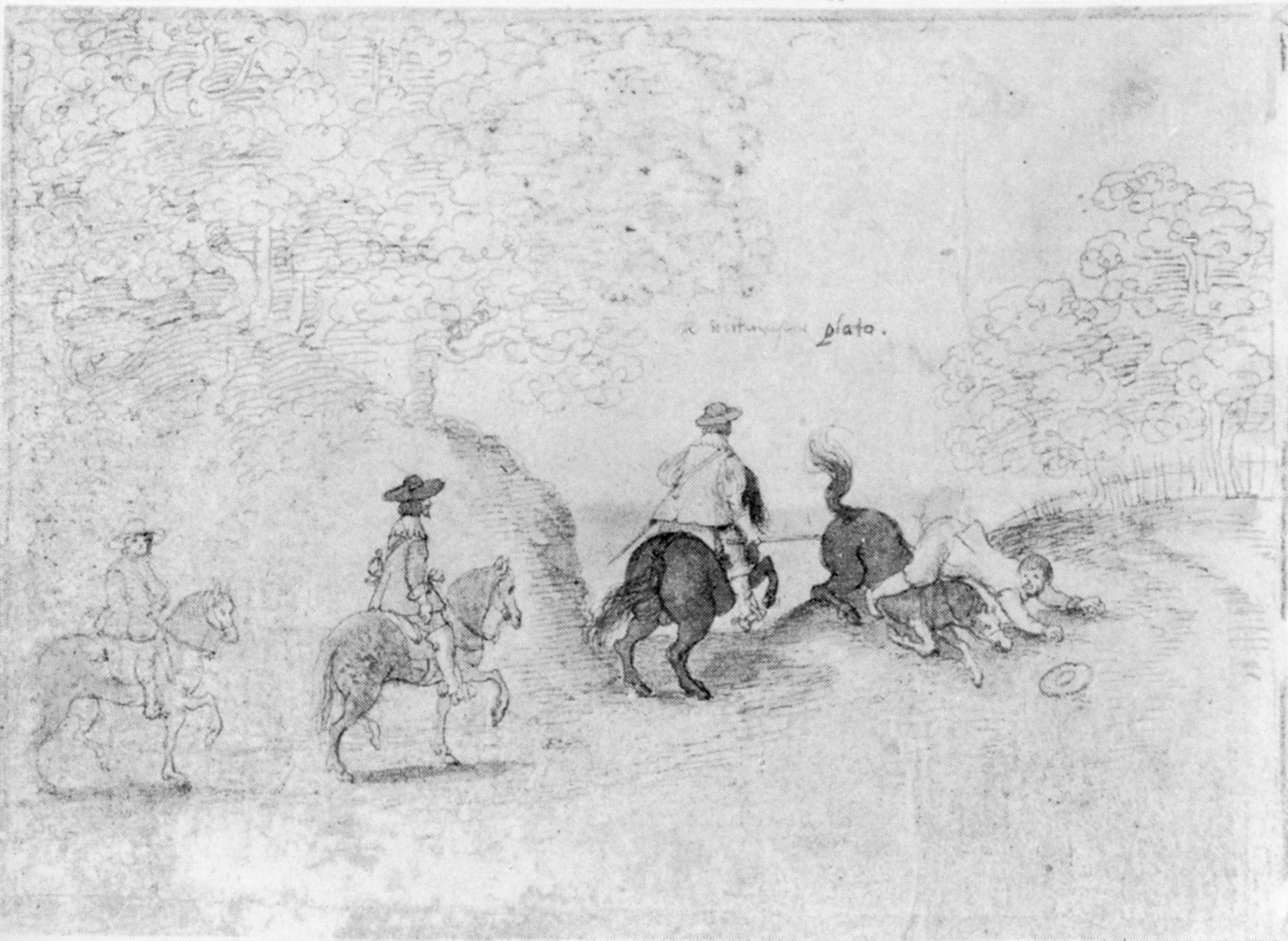 Der Reitunfall